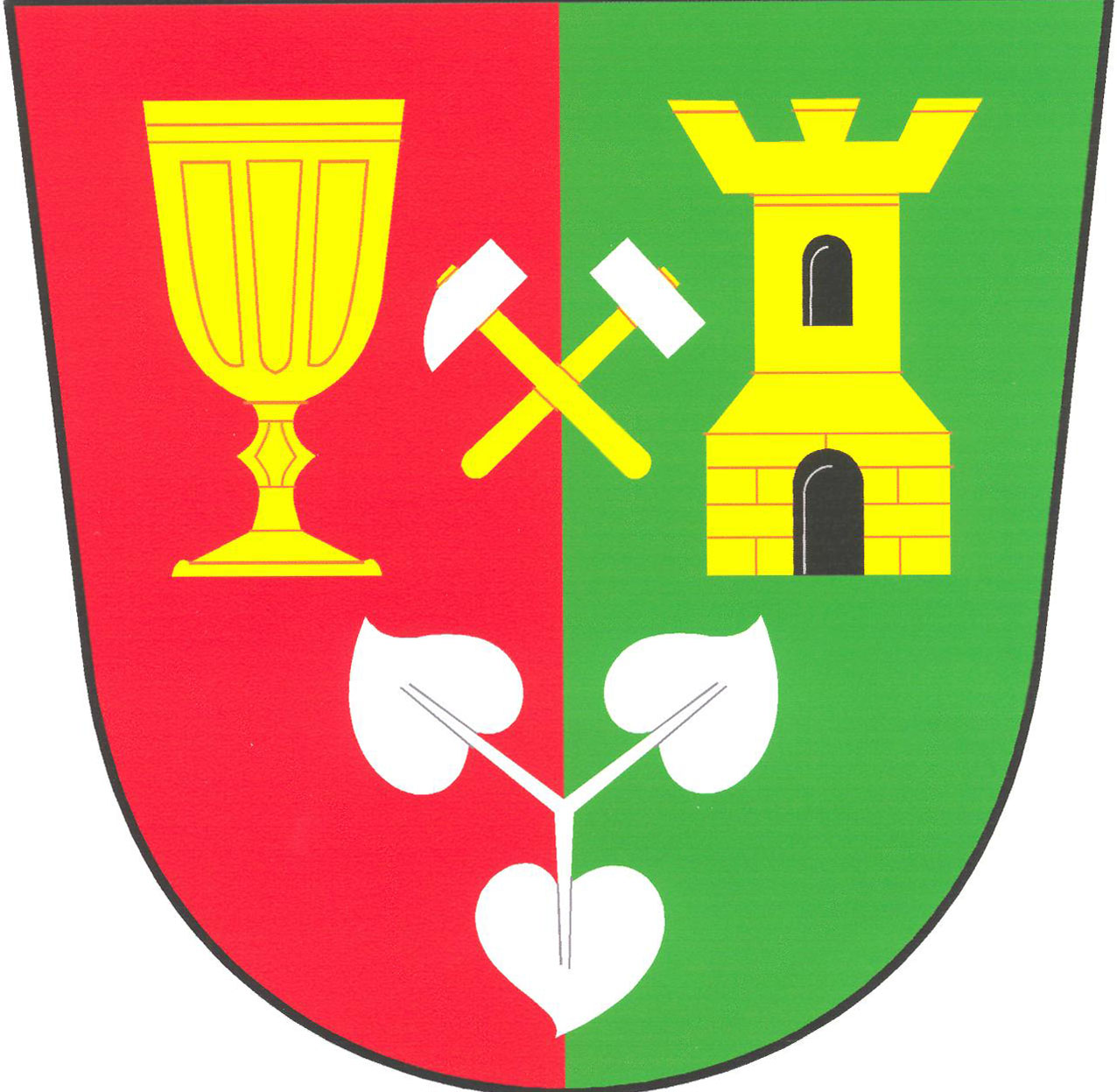 Znak obce Bělá (okres Havlíčkův Brod)